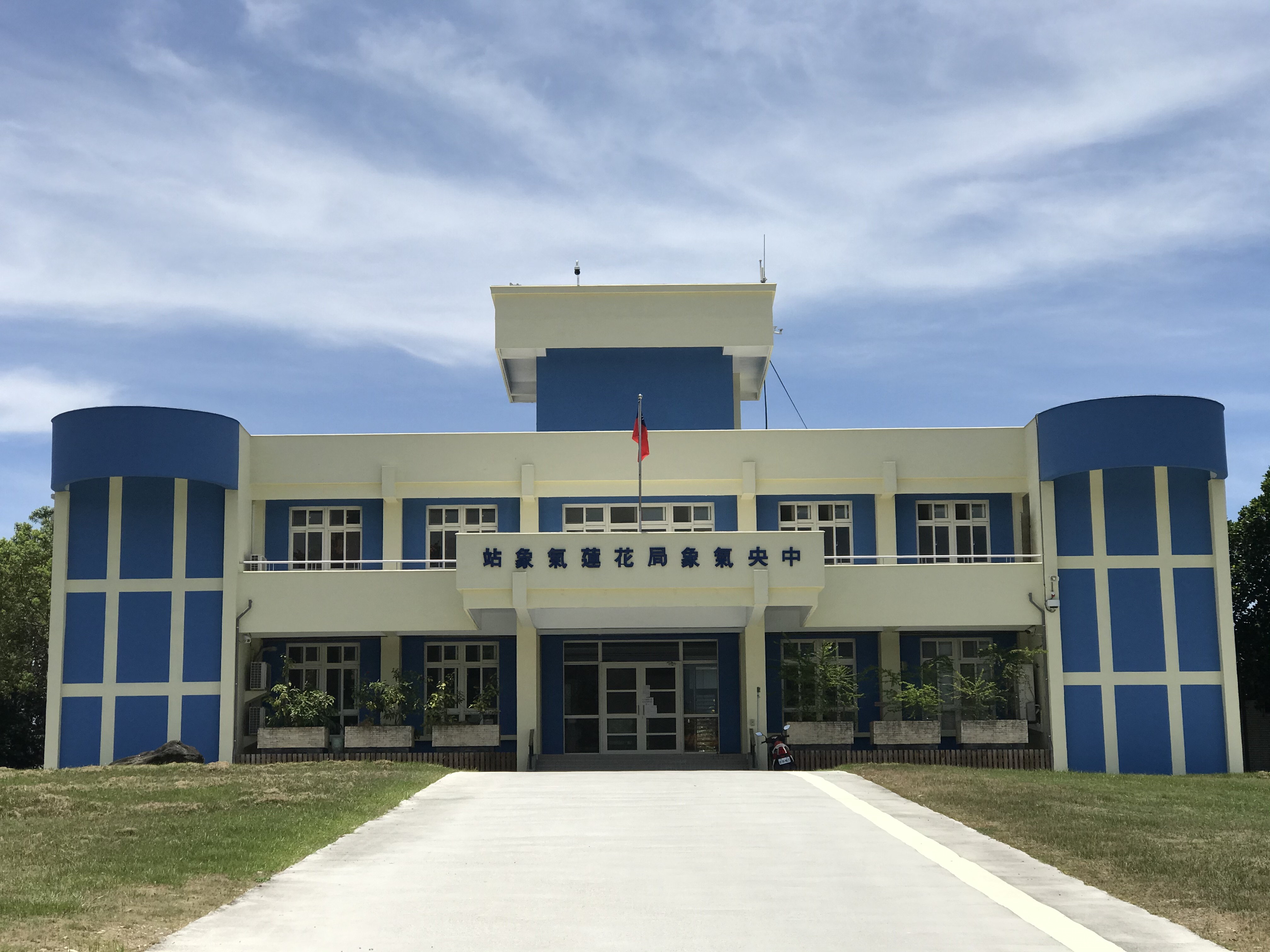 中文（台灣）: 交通部氣象局花蓮氣象站行政大樓